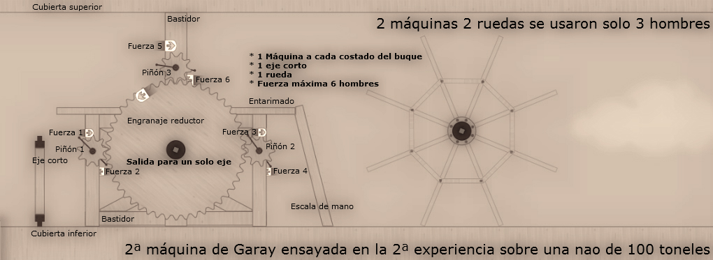 2ª máquina de Blasco de Garay